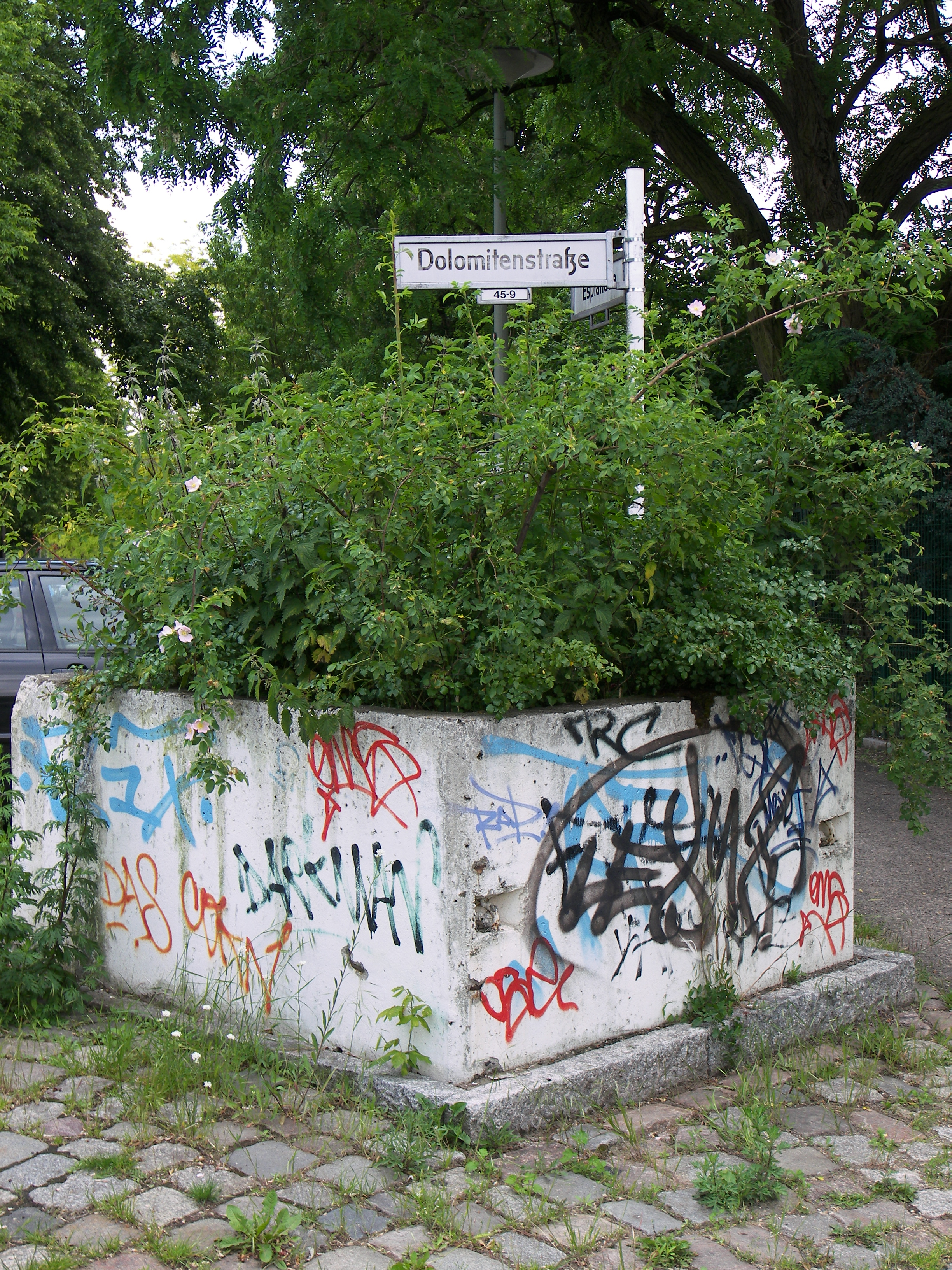 Blumenschalensperre Dolomitenstraße Ecke Esplanade Mai 2009